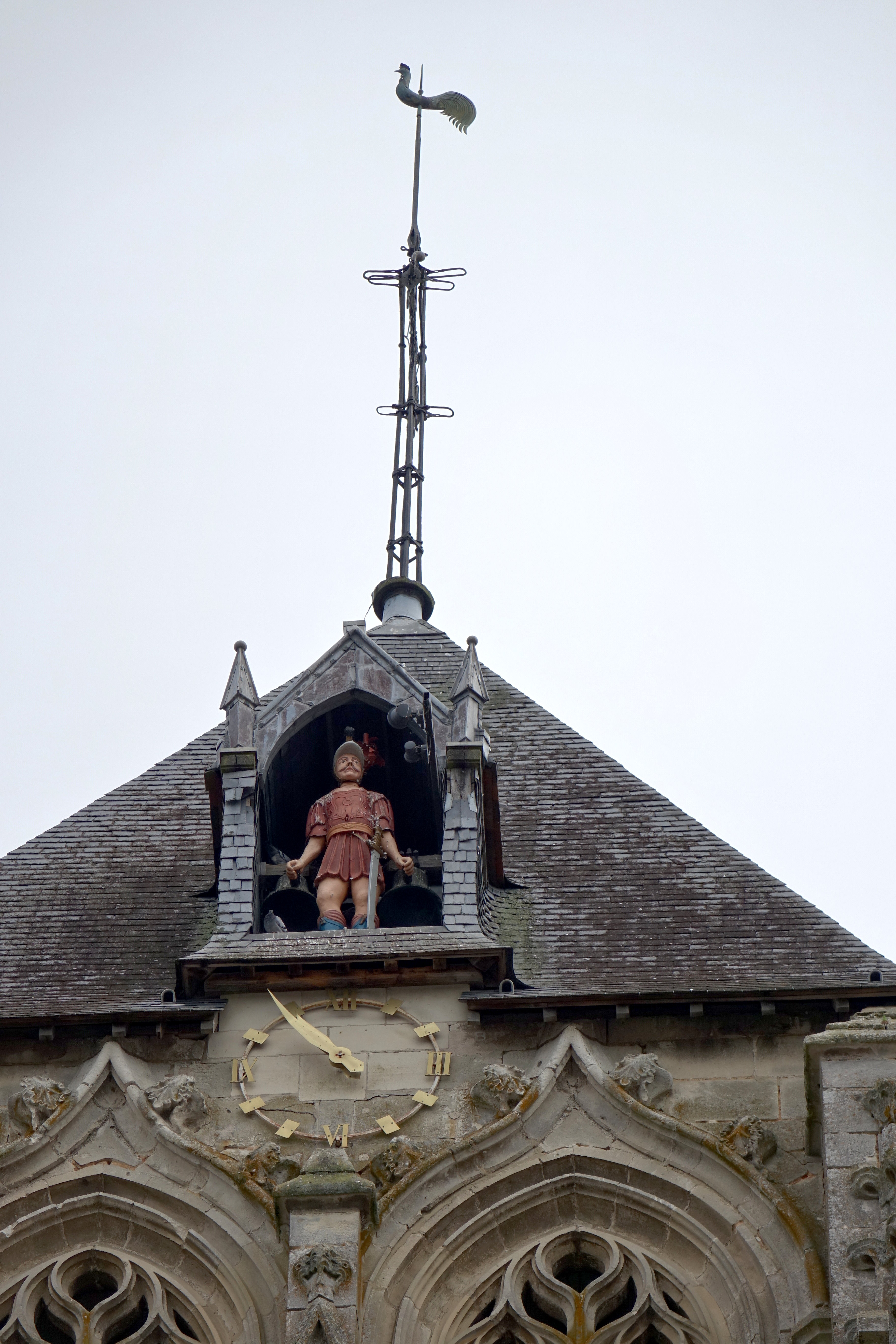 L'automate Régulus sur l'église Saint-Nicolas de Beaumont-le-Roger, Eure, France .